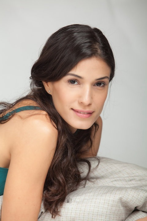 הדר רצון